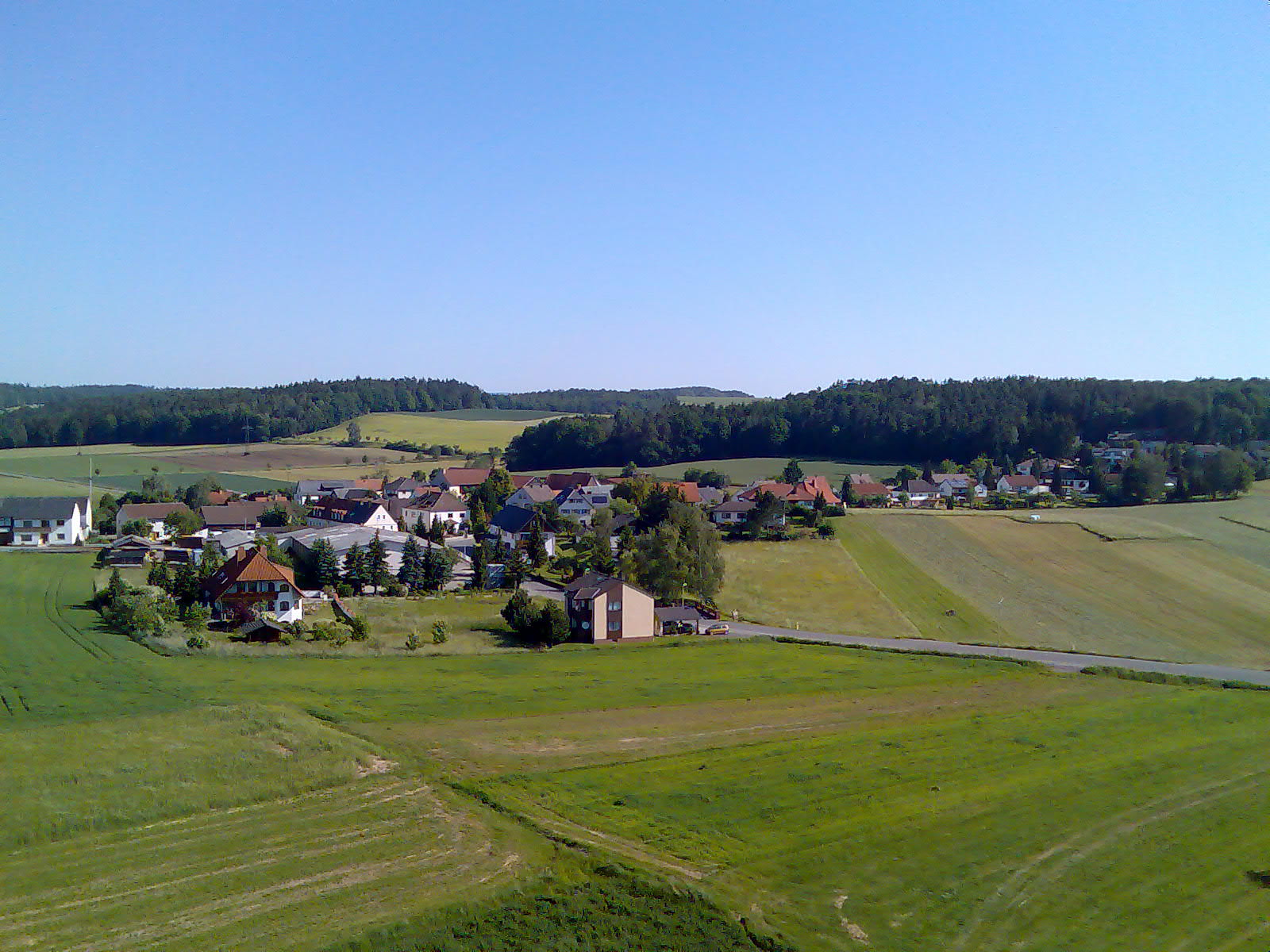 Ortsteil Friesendorf Quelle selbst fotografiert Urheber Ballalaika Datum 11.06.2006